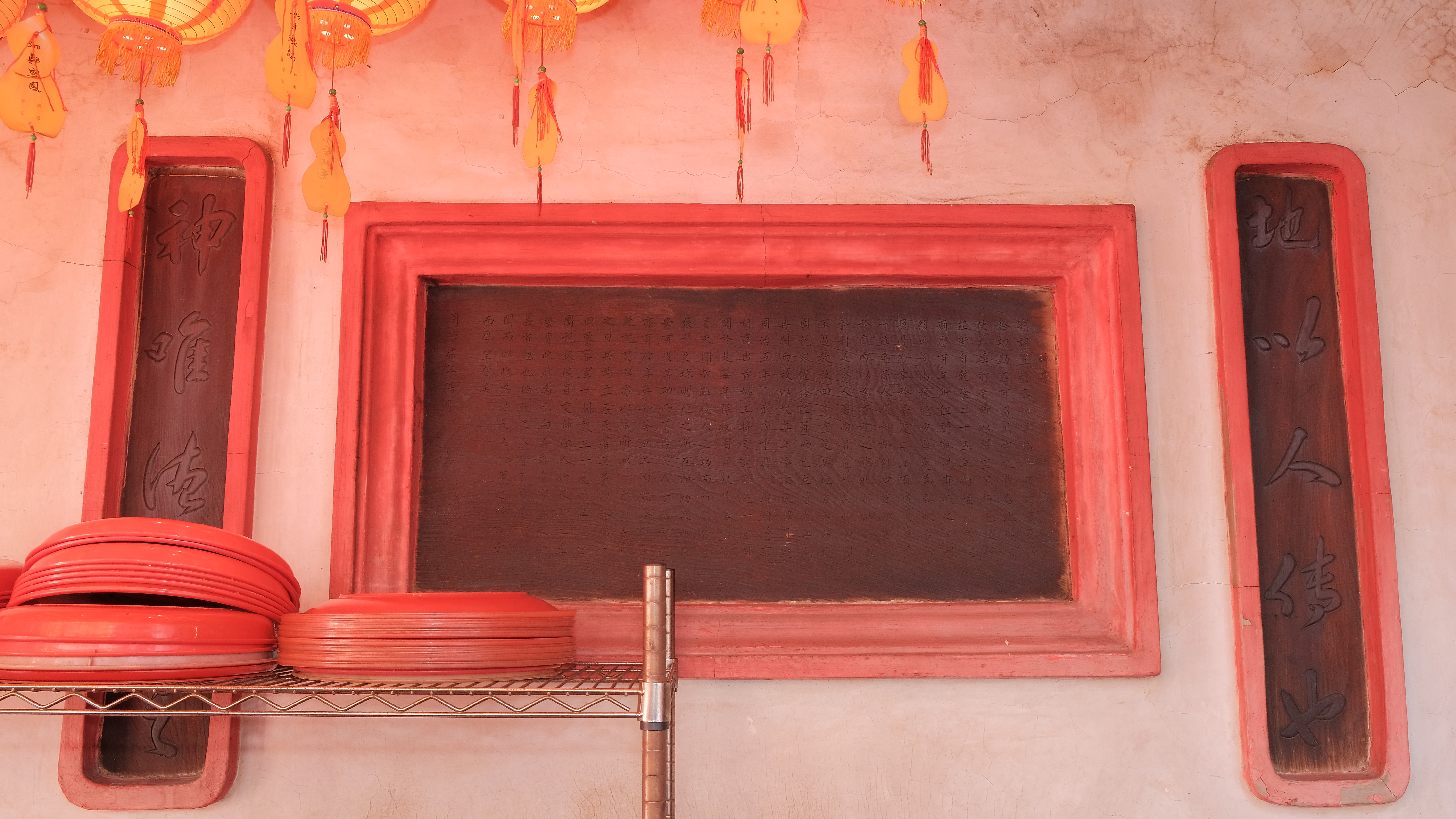 中文（台灣）: 2019 Xinzhuang Wusheng Temple 同治七年(1868年)武廟置產功德碑-艋舺縣丞郭志緯撰 碑文 碑序： 竊謂置產奉神，實為千秋之義舉。斯論功勒石，可留萬古之佳名；此從來仗義輕財者，所以昭垂不朽也。 緣新莊街自乾隆二十五年始置武聖廟，歷有年所。但聞廟貌甫成之日，利賴無多，倡緣絕少，難免為奉祀者所隱憂；乃幸於嘉慶二年有廣東嘉應州鎮平縣人張穆將錫口庄田園獻於廟內，以為香祀之資，此誠計義不計利，足令人嘉尚者也。 然其時田園不過數畝，四旁盡是曠地，每年所收園稅銀僅拾陸員而已。至道光年間，再闢兩畝，以故每年添收銀肆員。迨同治五年武廟重興，緯與諸董事相商出首鳩工，將旁邊之地一盡開闢，於是每年得收園稅銀共參拾陸員。夫闢者雖後人之功，而所闢者實張穆之地；則地之所在即功之所在，安可沒其功而不存其人乎？雖前此亦有碑序，無如癸丑年內港分類，廟既就焚、碑亦以滅；所以武廟告成之日共為立石，表著其石。即於錫口田□築室一間，設主一座，歷年抽出園稅銀陸員，交付佃人作春、秋二季祭費。 此雖為已向義者嘉，實為未向義者勉也。倘後之人有不甘寂寂無聞而已，此為法，是又緯等之所深幸而厚望者矣！ 同治柒年陽月 日，署理新莊縣丞郭志緯撰，生員張揚書，董事陳福助立。